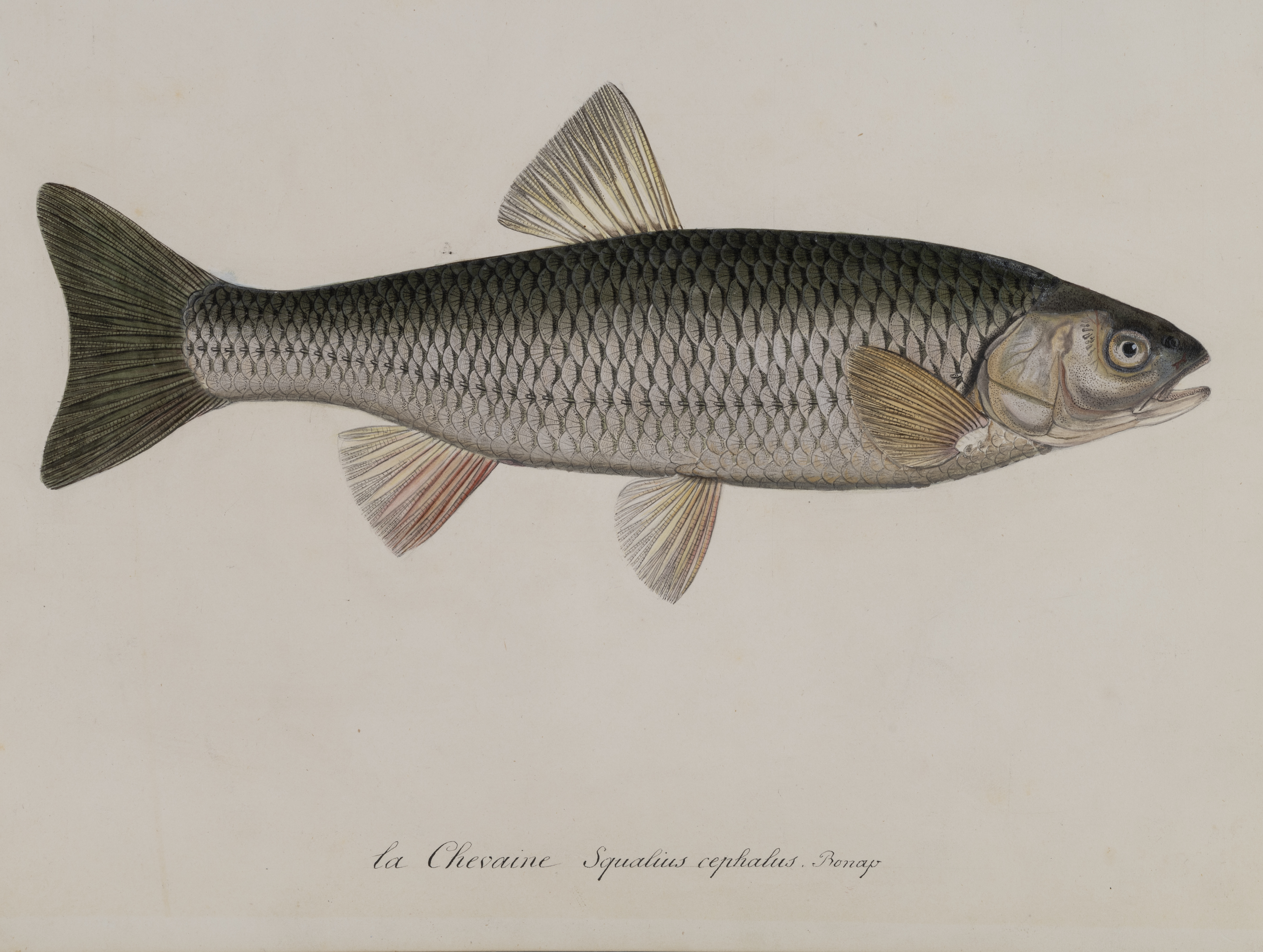 "La Chevaine Squalius cephalus Bonap."